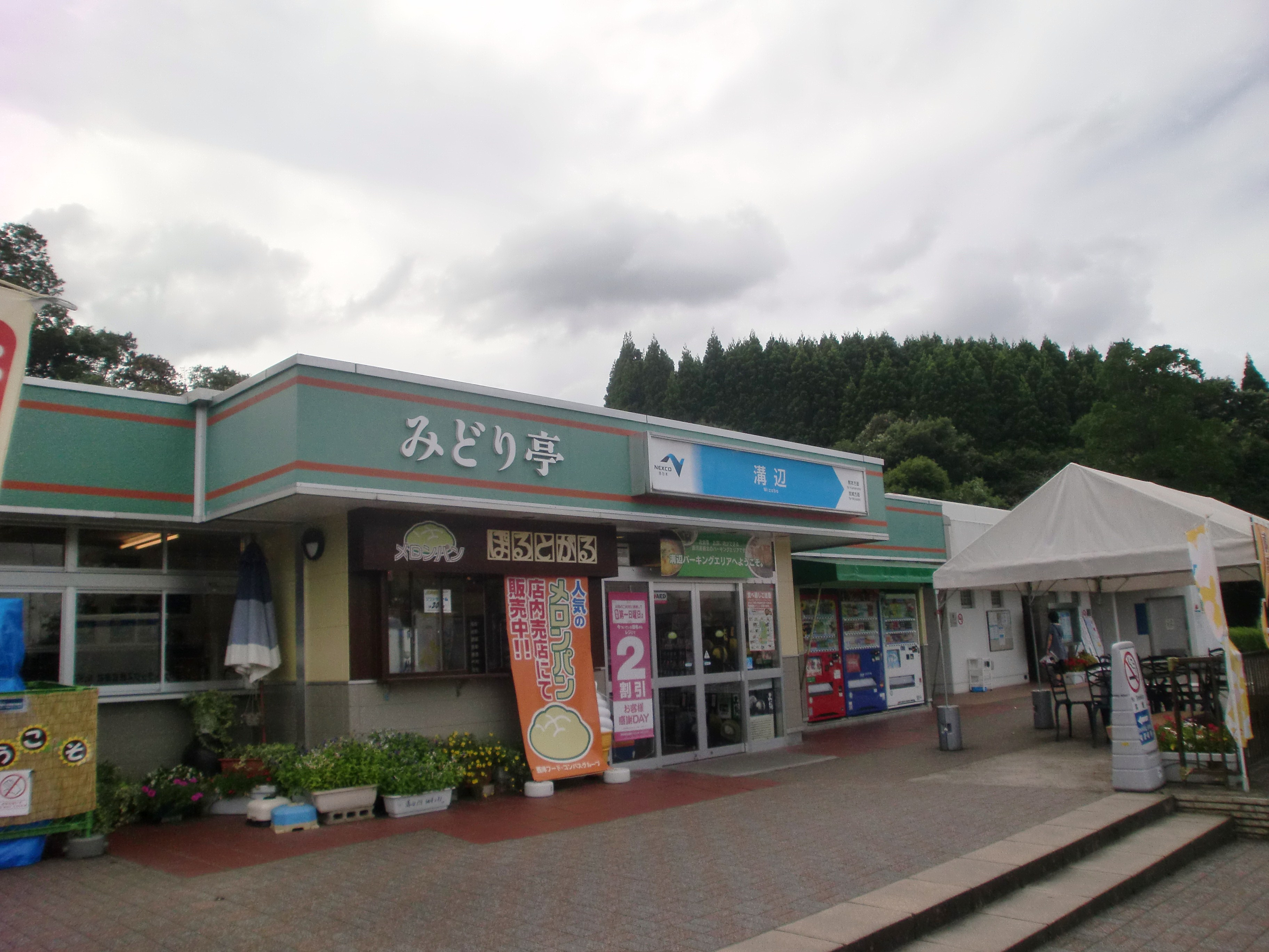 溝辺パーキングエリアの外観。